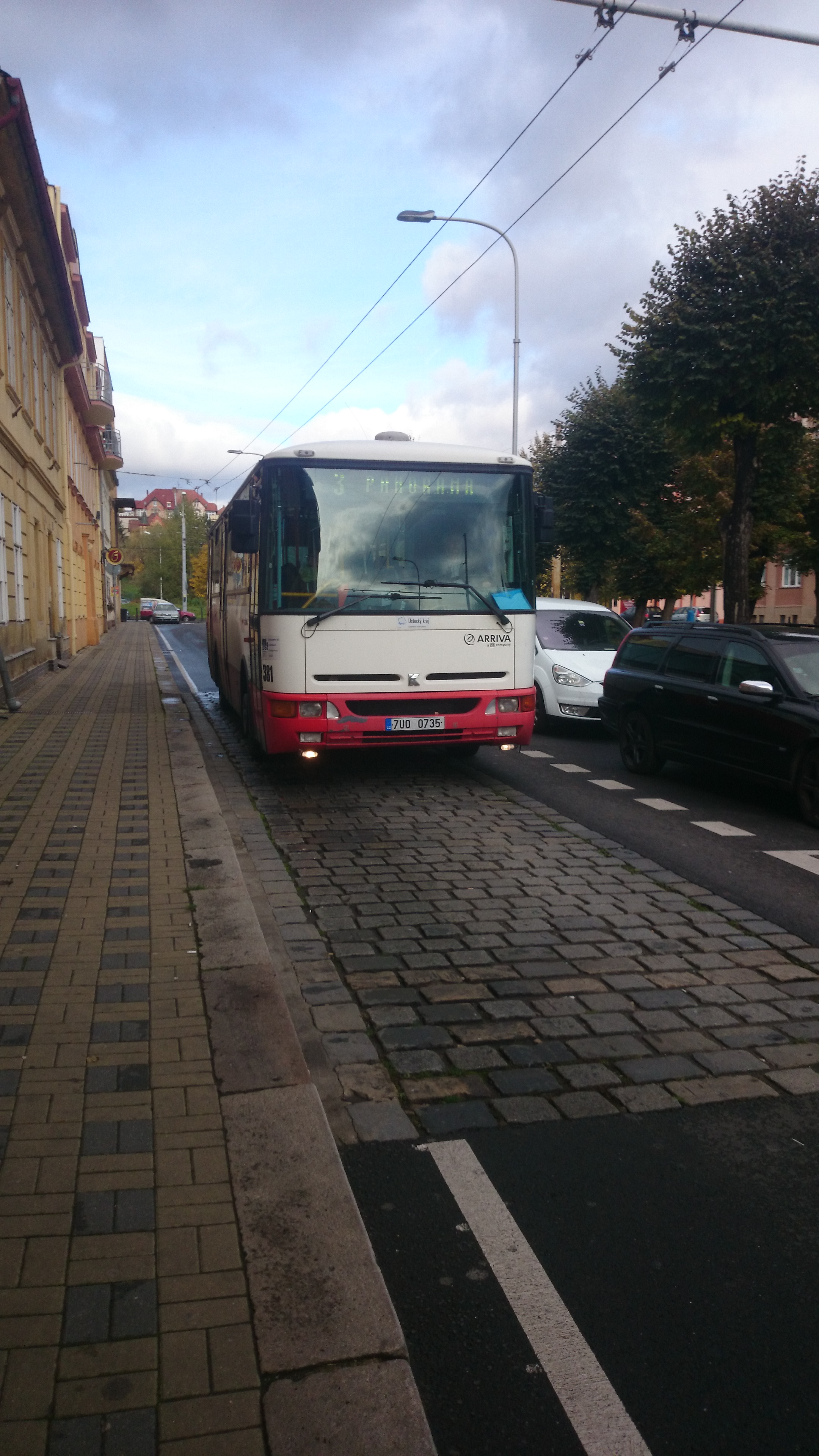 Karosa B952 #381 SPZ 7U0 0735 u hotelu Plaza v Teplicích na lince 3 Šanov I lázně→Panorama. Autobus původně z Bánské Bystrice.